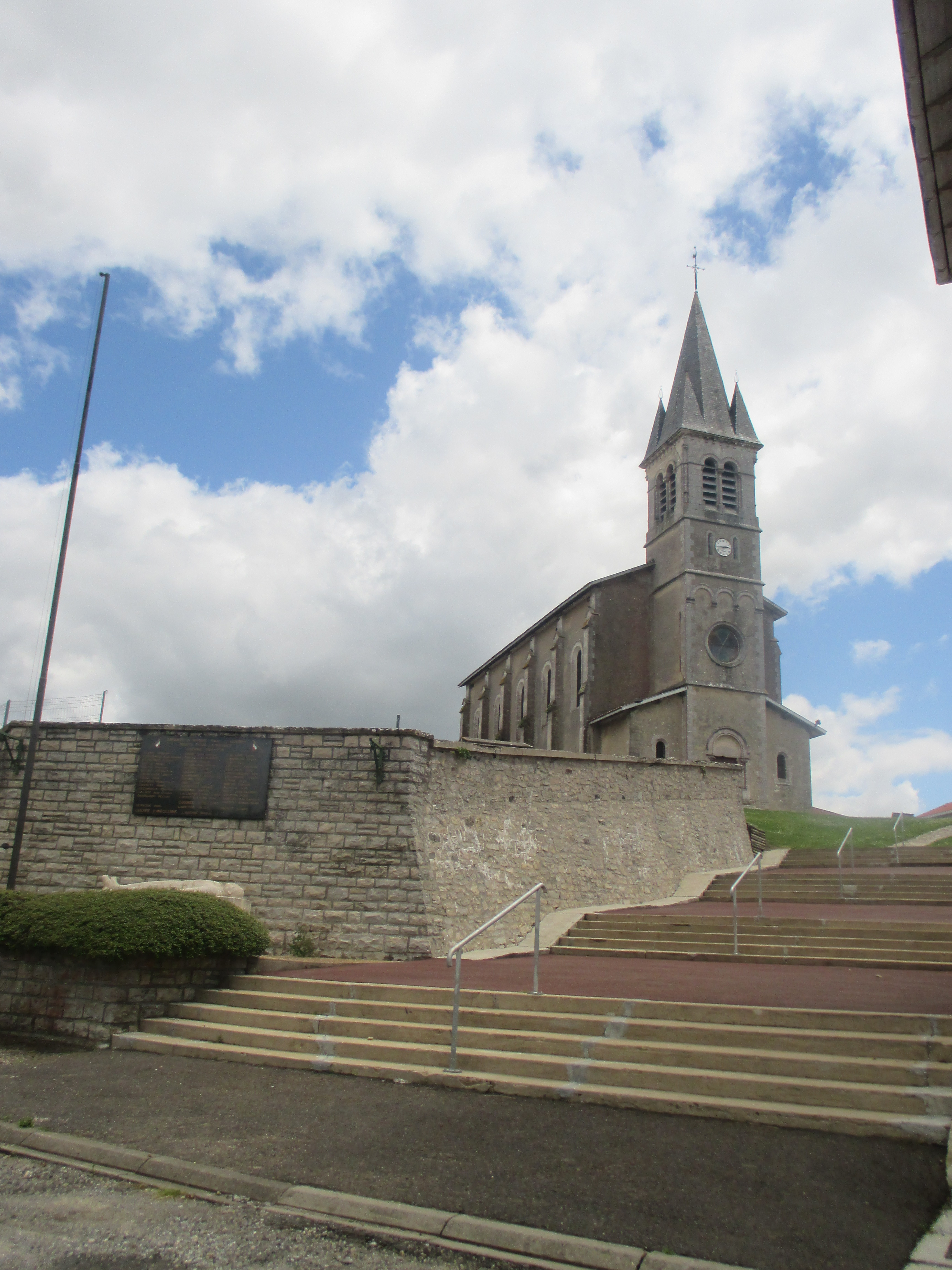 Voici l'église